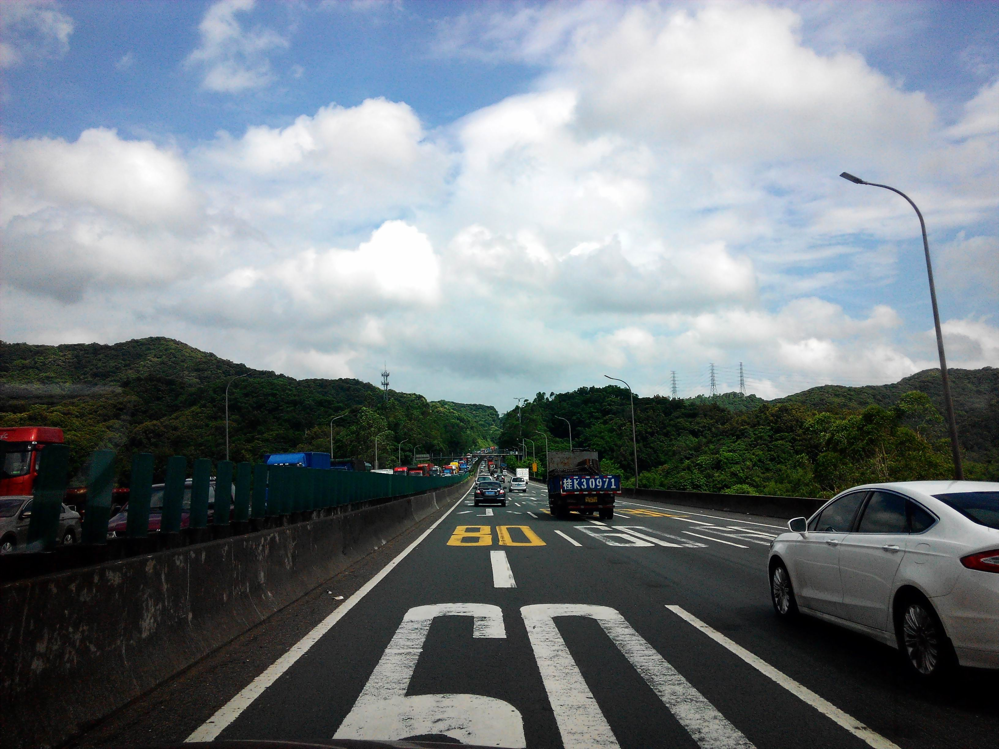 中国高速G1501（广州）天鹿湖段 逆时针方向